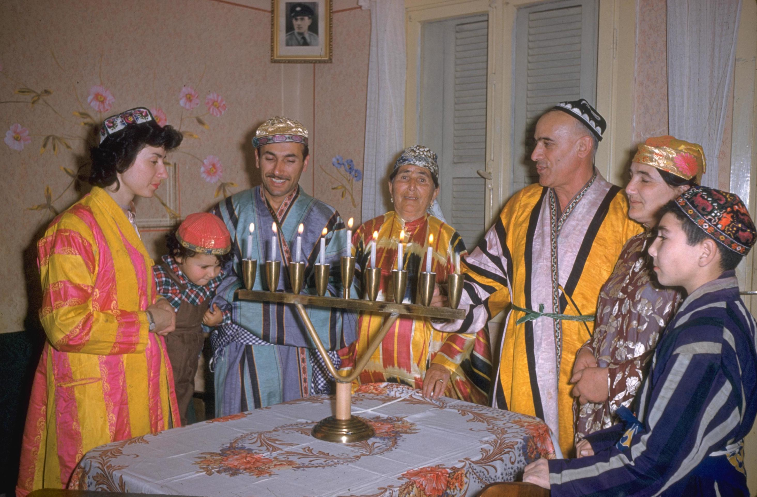 FOUR GENERATIONS OF THE KALANTAROV FAMILY OF THE BUCHARIAN COMMUNITY LIGHT THE HANNUKAH CANDLES IN THEIR HOME IN THE FLORENTIN QUARTER, TEL AVIV (31/12/1959). ארבעה דורות של משפחת קלנרוב מהקהילה הבוכרית מדליקים נרות חנוכה בביתם בשכונת פלורנטין בתל אביב Photo: GPO.